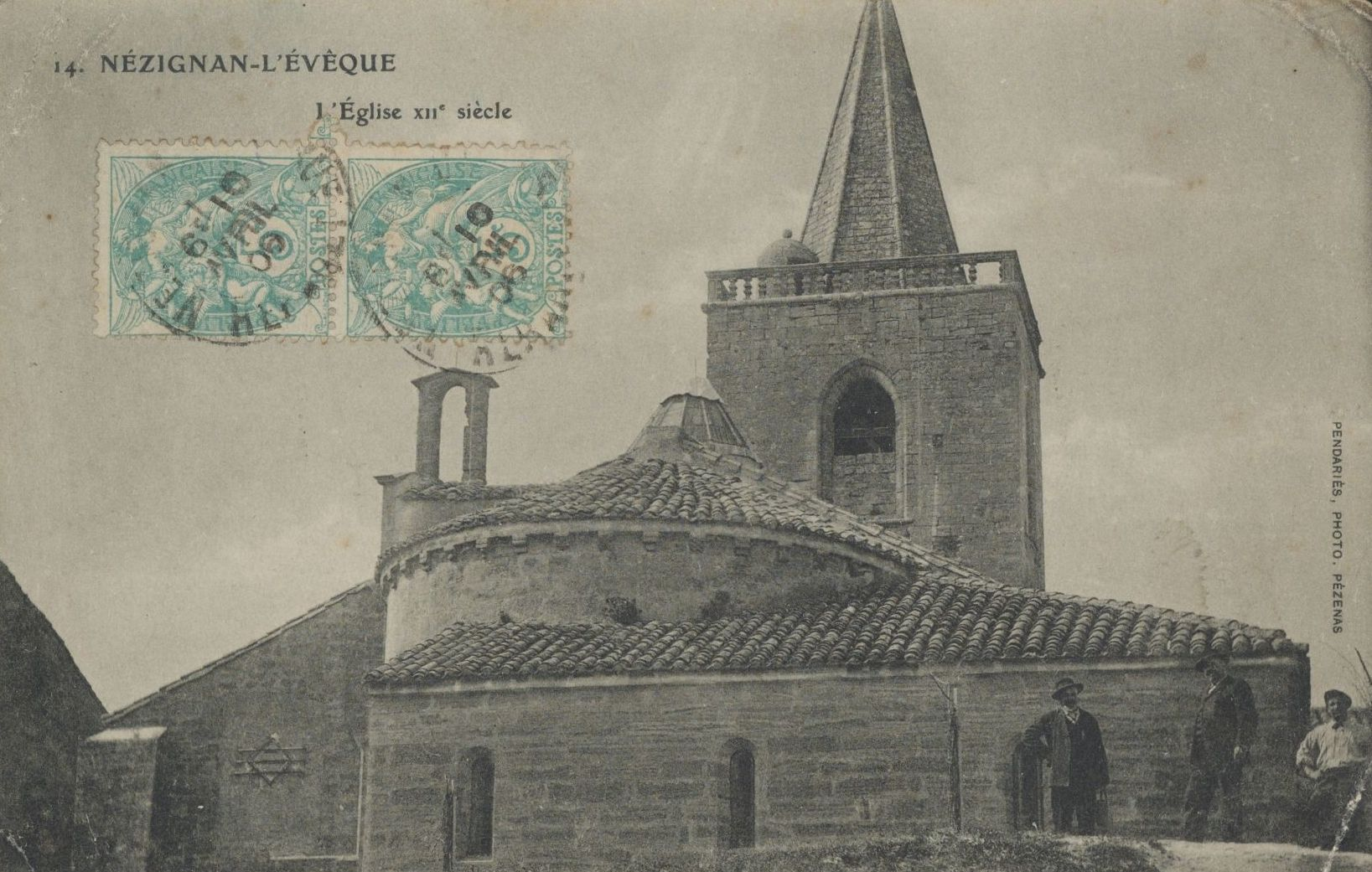 Nézignan-l'Evêque. - L'église 12th century date QS:P,+1150-00-00T00:00:00Z/7 : carte postale